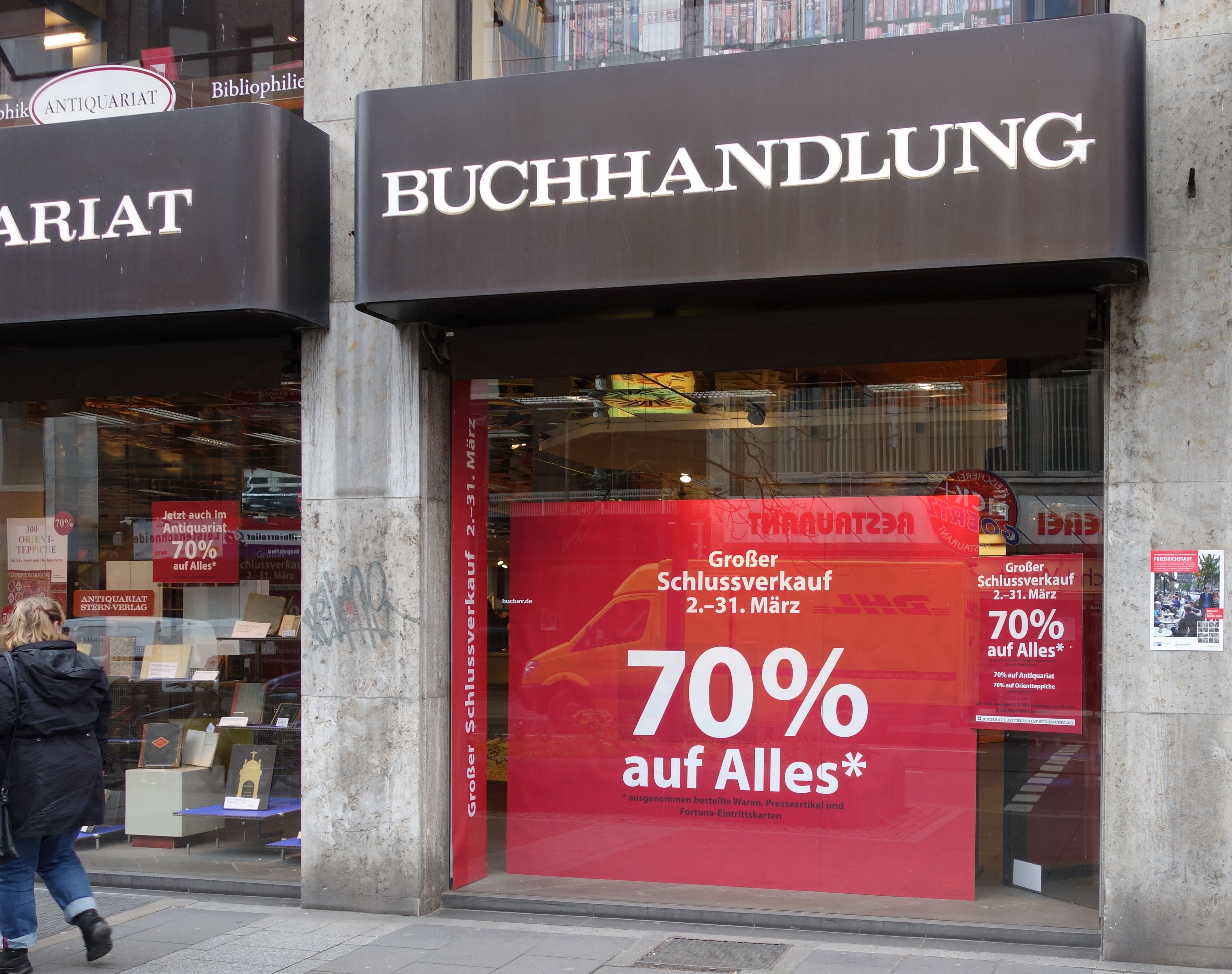 Stern-Verlag, Düsseldorf, Friedrichstraße, am Tag der Geschäftsschließung, 31. März 2016.